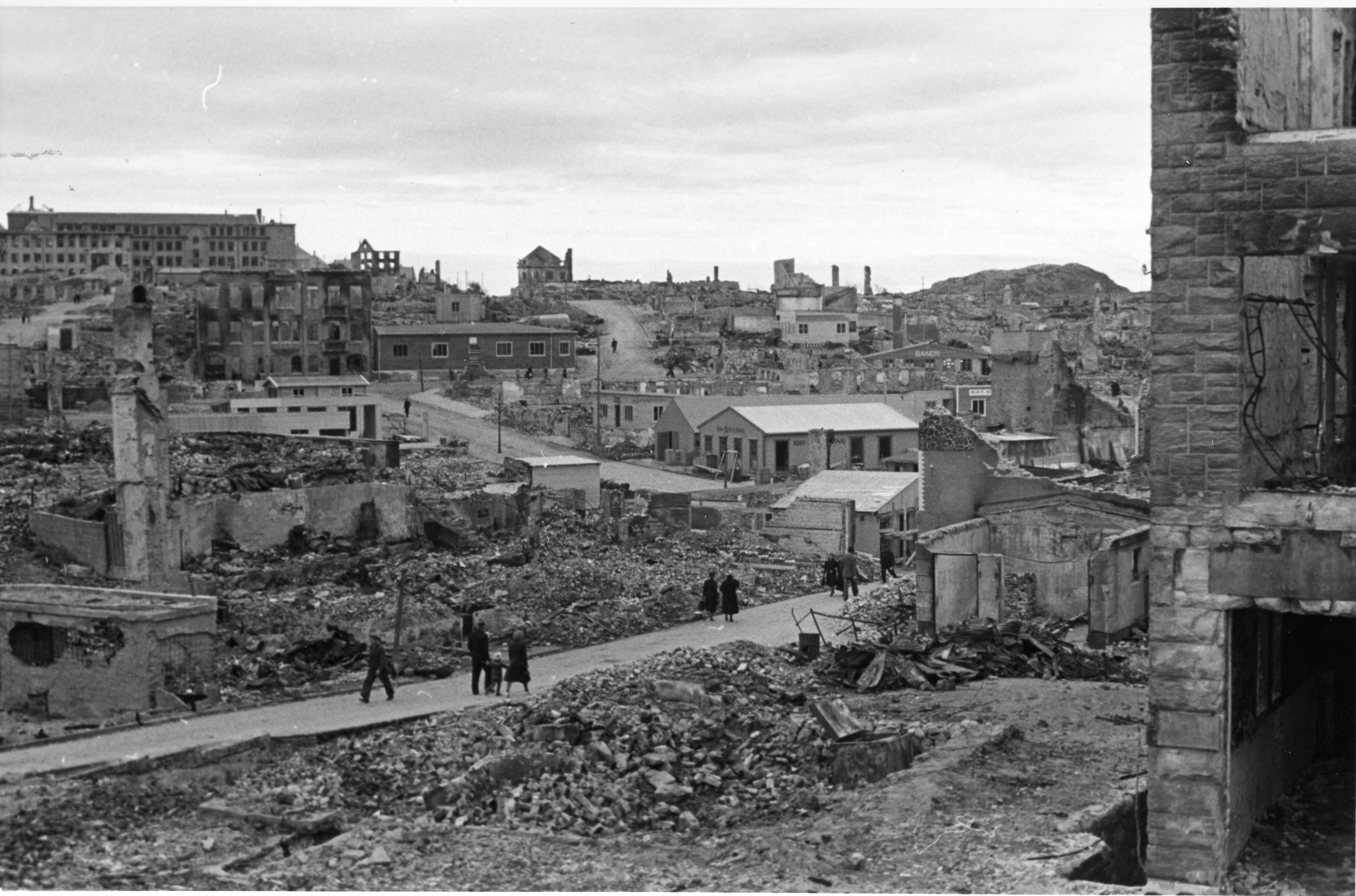 Bildet er hentet fra Arkivverket. Kristiansund i ruiner. Arkivinstitusjon : Riksarkivet Arkivnavn : Løken, Hallvard Sted : Norge, Møre og Romsdal, Kristiansund, Kristiansund Emneord: 2. verdenskrig, Andre verdenskrig Avbildet